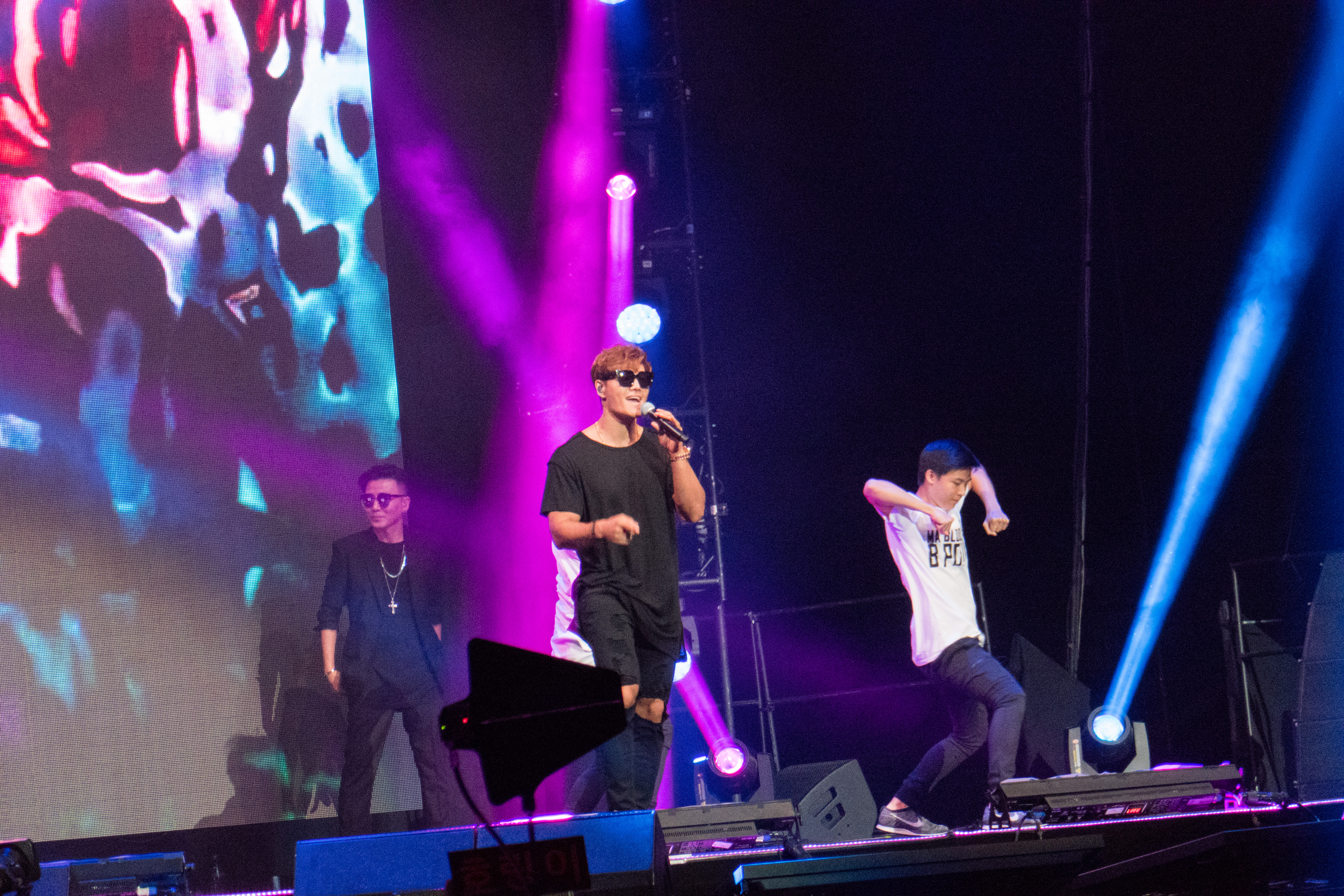 20160731-P1010010